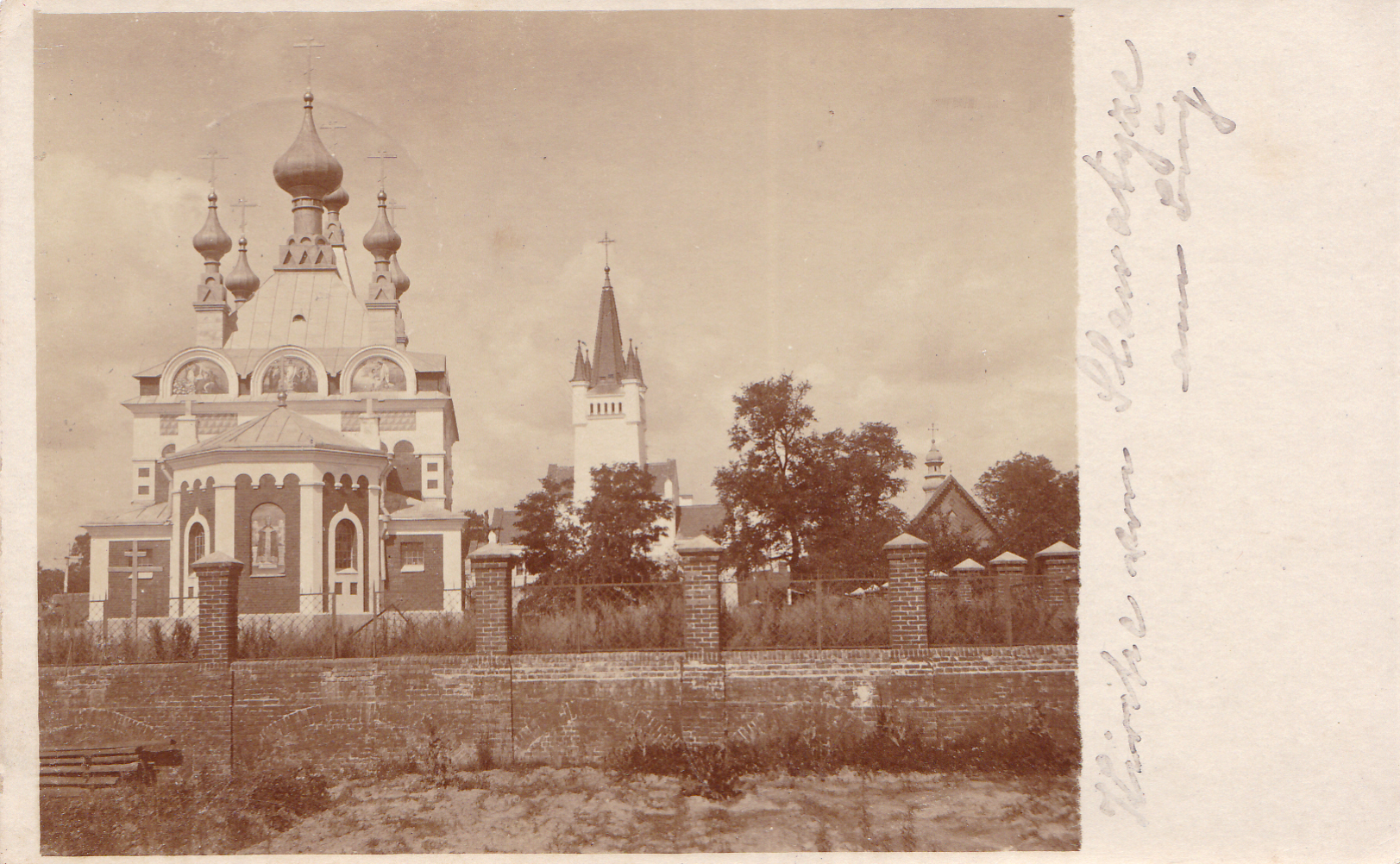 Беларуская (тарашкевіца): Славатычы (Słavatyčy), пляц Рынак (plac Rynak). Новая царква-мураўёўка, касьцёл і старая царква